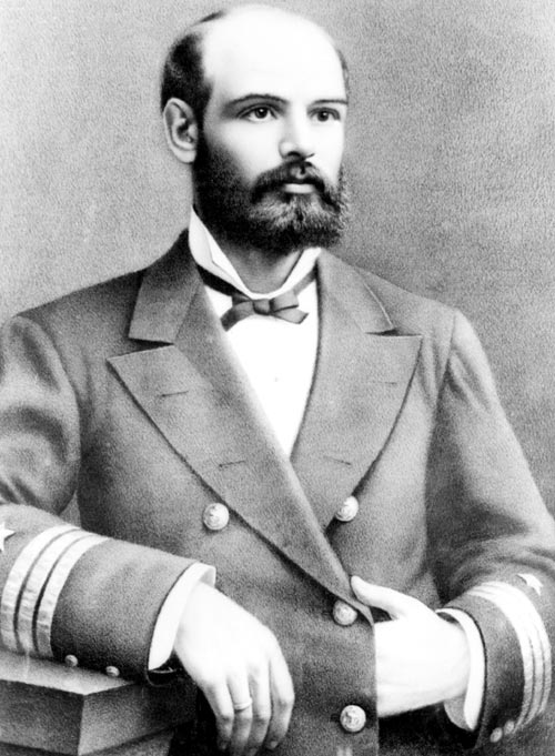 Foto del héroe naval chileno Arturo Prat